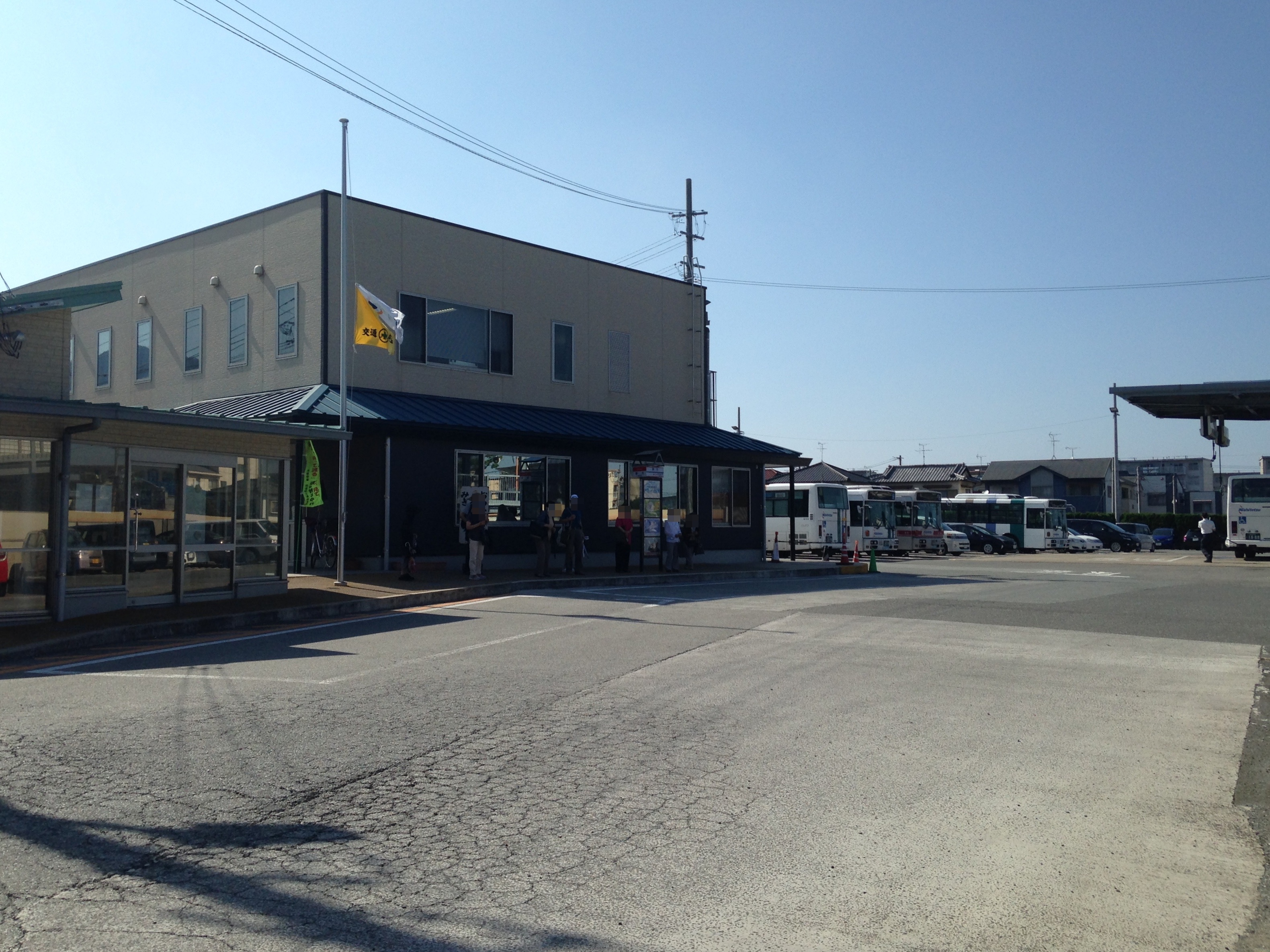 福岡市西区・西日本鉄道壱岐自動車営業所